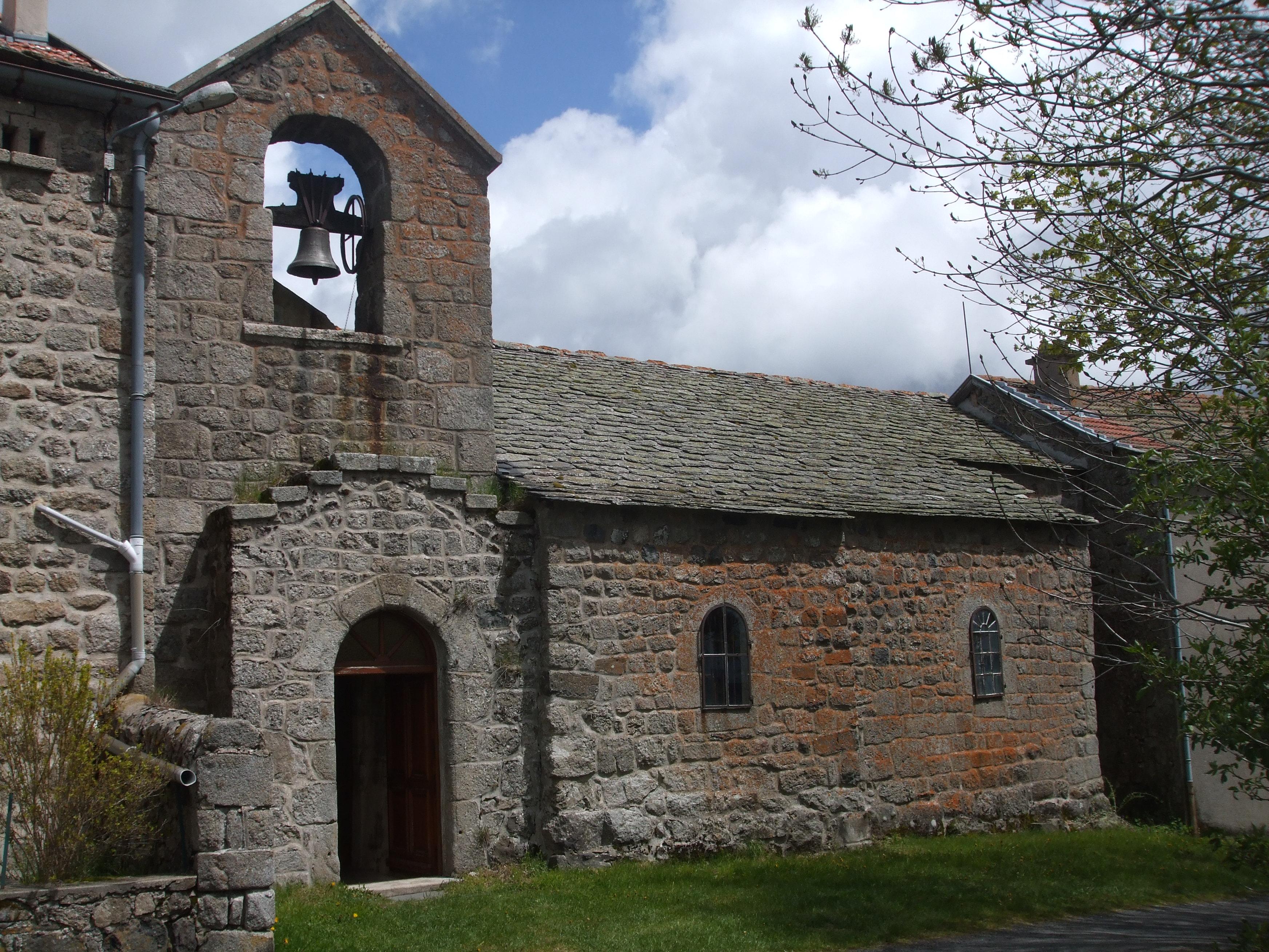 église Saint Romain